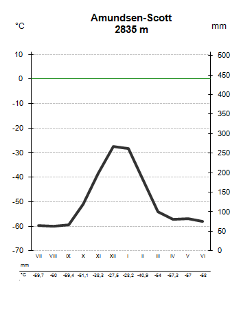 Amundsen-Scotti polaarjaama kliimadiagramm